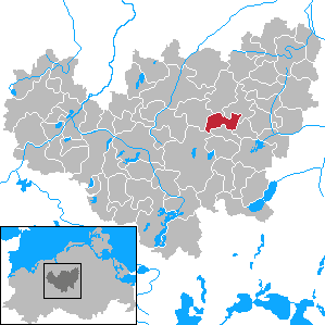 Warnkenhagen in Mecklenburg-Vorpommern - District Güstrow